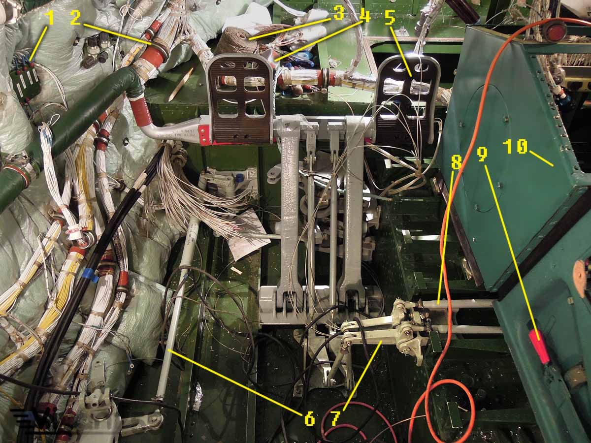 1 - минусовые зажимы, 2 - хомут, 3 - нить "Маккей", 4 - лента ЛЭТСАР-0,2, 5 - правая педаль, 6 - тяга путевого управления, 7 - качалка, 8 - тяга управления тормозами правой опоры шасси, 9 - рукоятка стопорения рулей и элеронов, 10 - средний пульт лётчиков (пьедестал)